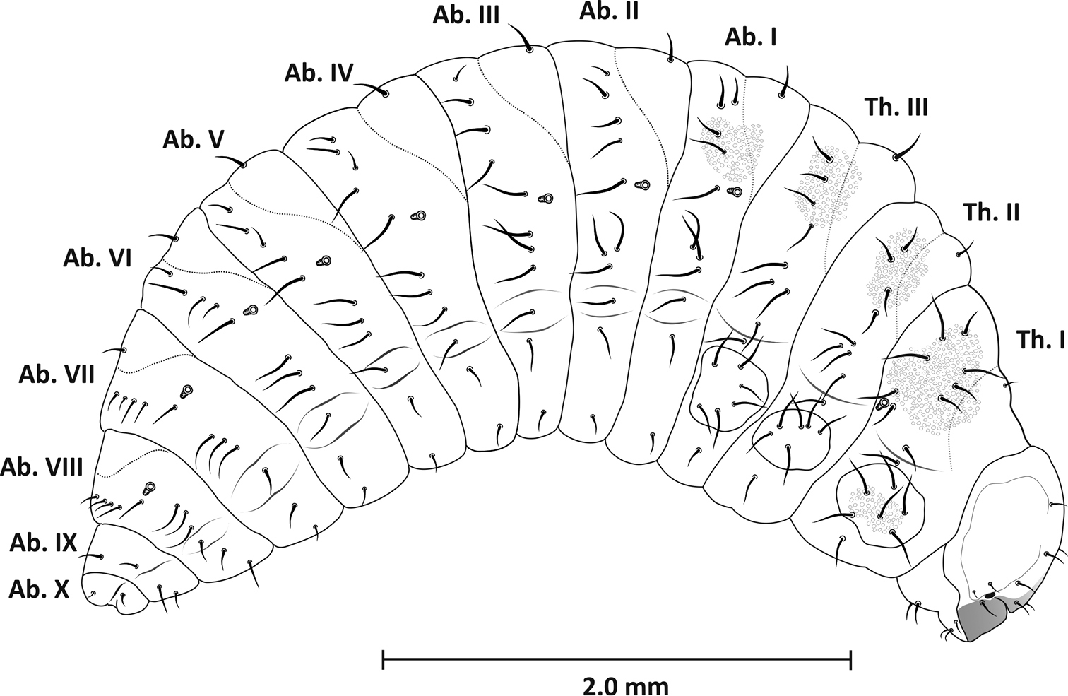 Figure 1; Mature larva (L3), lateral view.